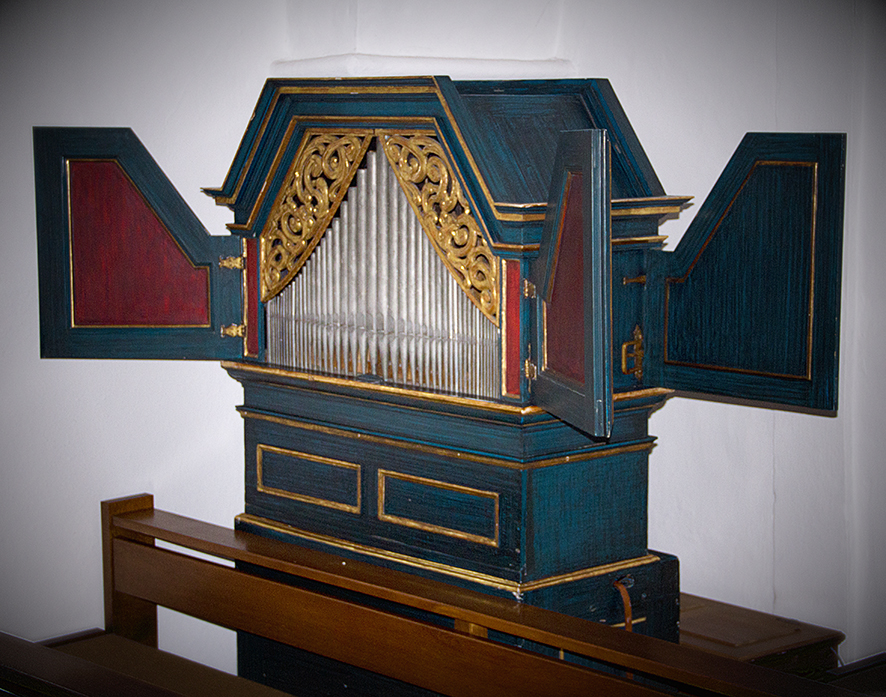 Geöffneter Rückprospekt des Kupferberger Positivs in der St. Josefskapelle (Werktagskapelle) der St. Jakobskirche in Bamberg